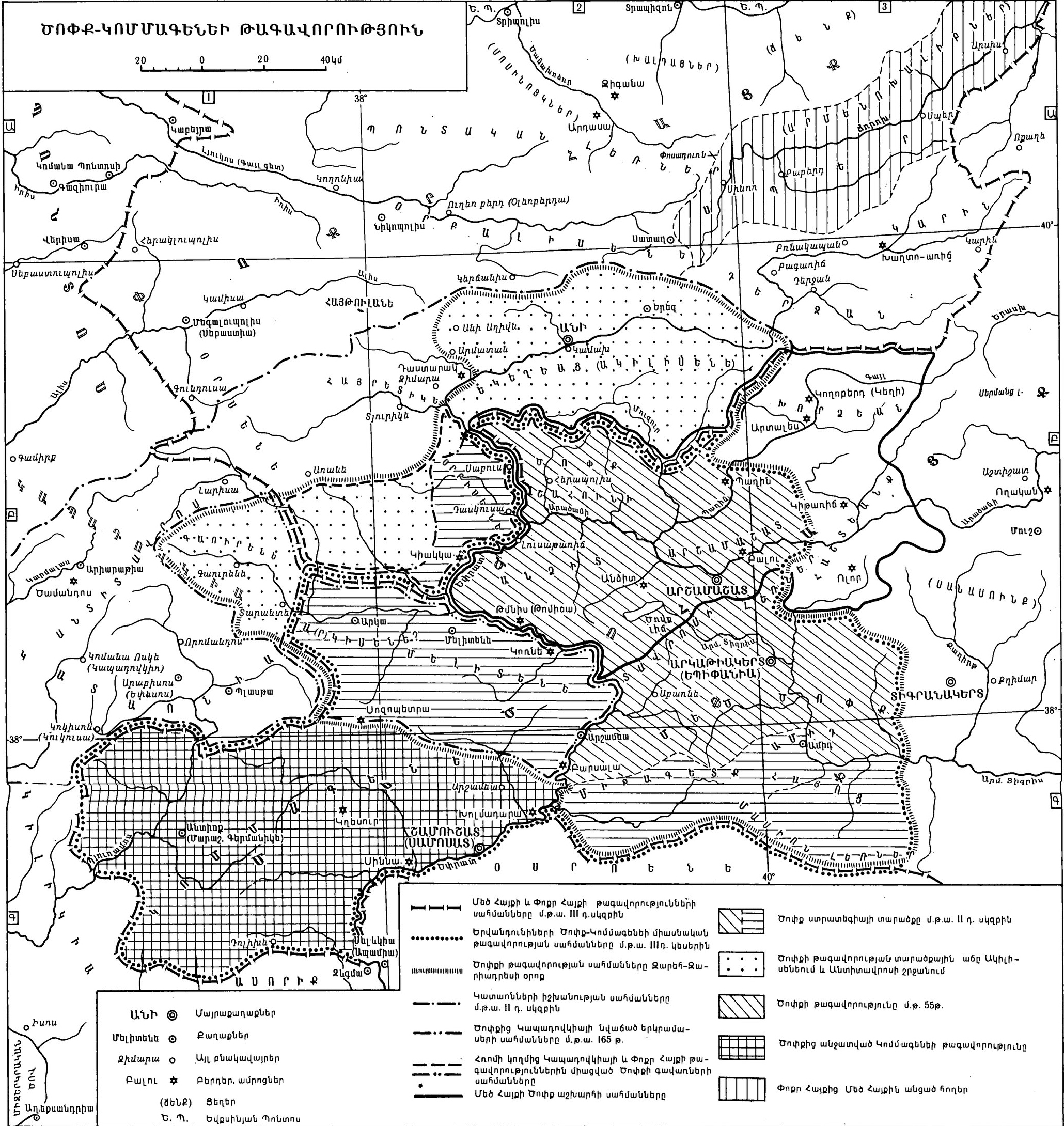 Ծոփք նահանգ